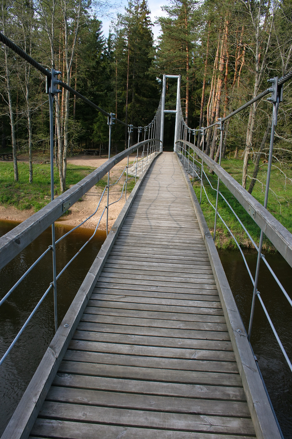 Bridge over Šventoji near Inkūnai, Anykščiai district, Lithuania